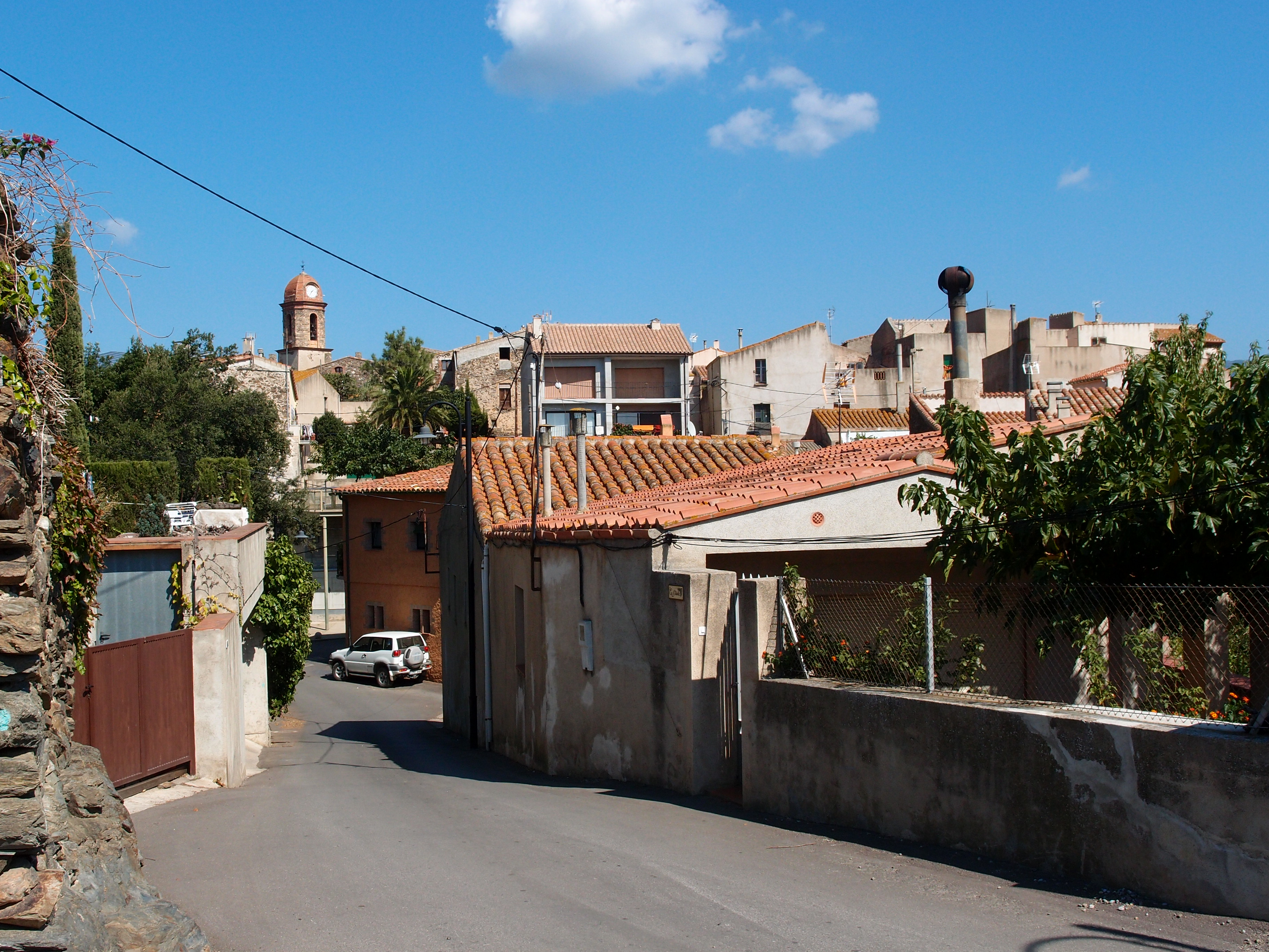 Espolla (Katalonien/Spanien) Datum: 26.09.2011 Urheber: M. Pfeiffer alias Gordito1869 Quelle: Privates Fotoarchiv des Urhebers